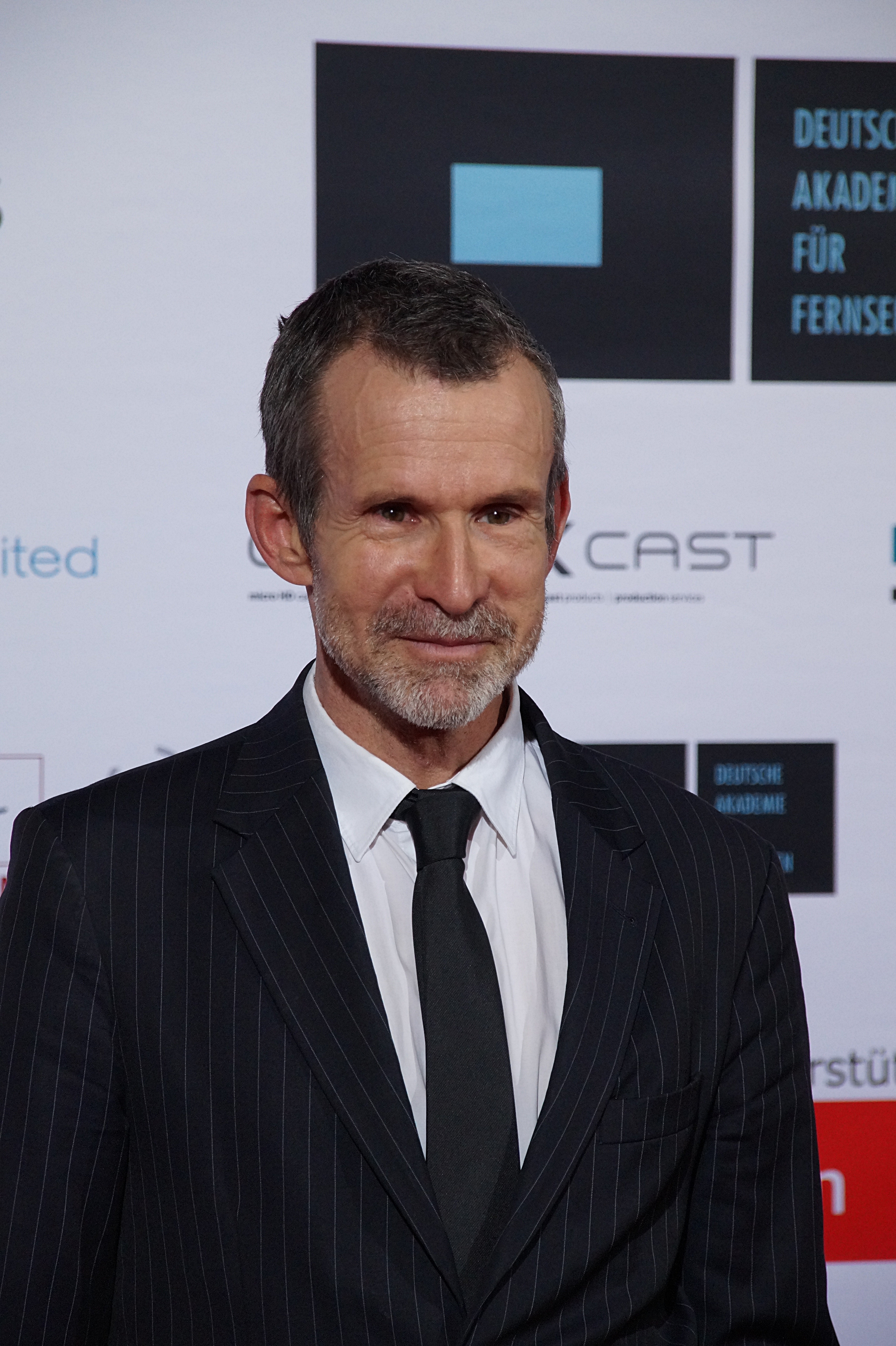 Ulrich Matthes bei der Verleihung zur Auszeichnung 2015, durch die Deutsche Akademie für Fernsehen, im November 2015.